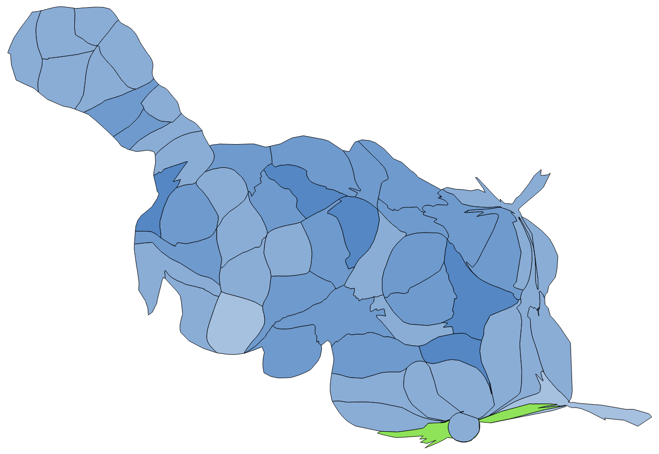 中文（台灣）: 顏色對照表